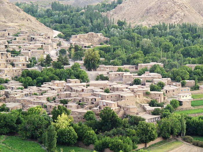 دورنمای از روستای زیبای طبس سبزوار